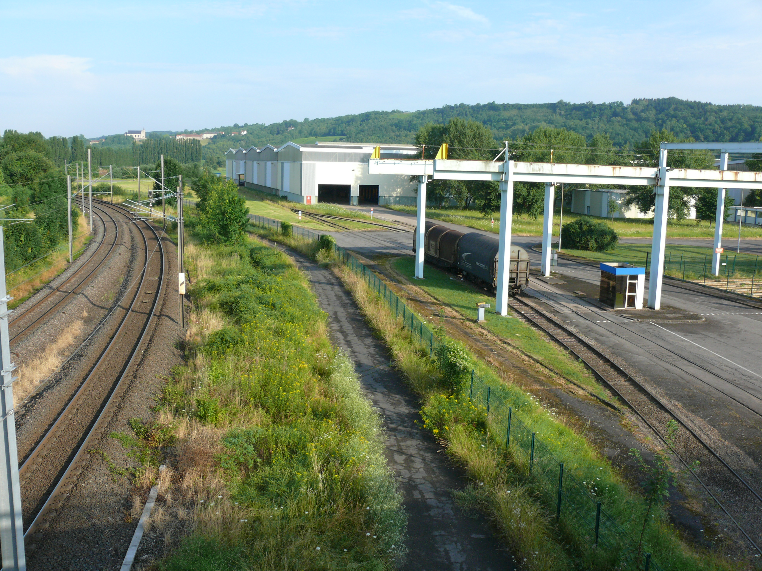 Site de Lorraine Tubes à Rettel, embranché en Gare de Sierck-les-Bains